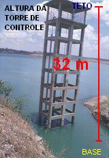 torre de controle